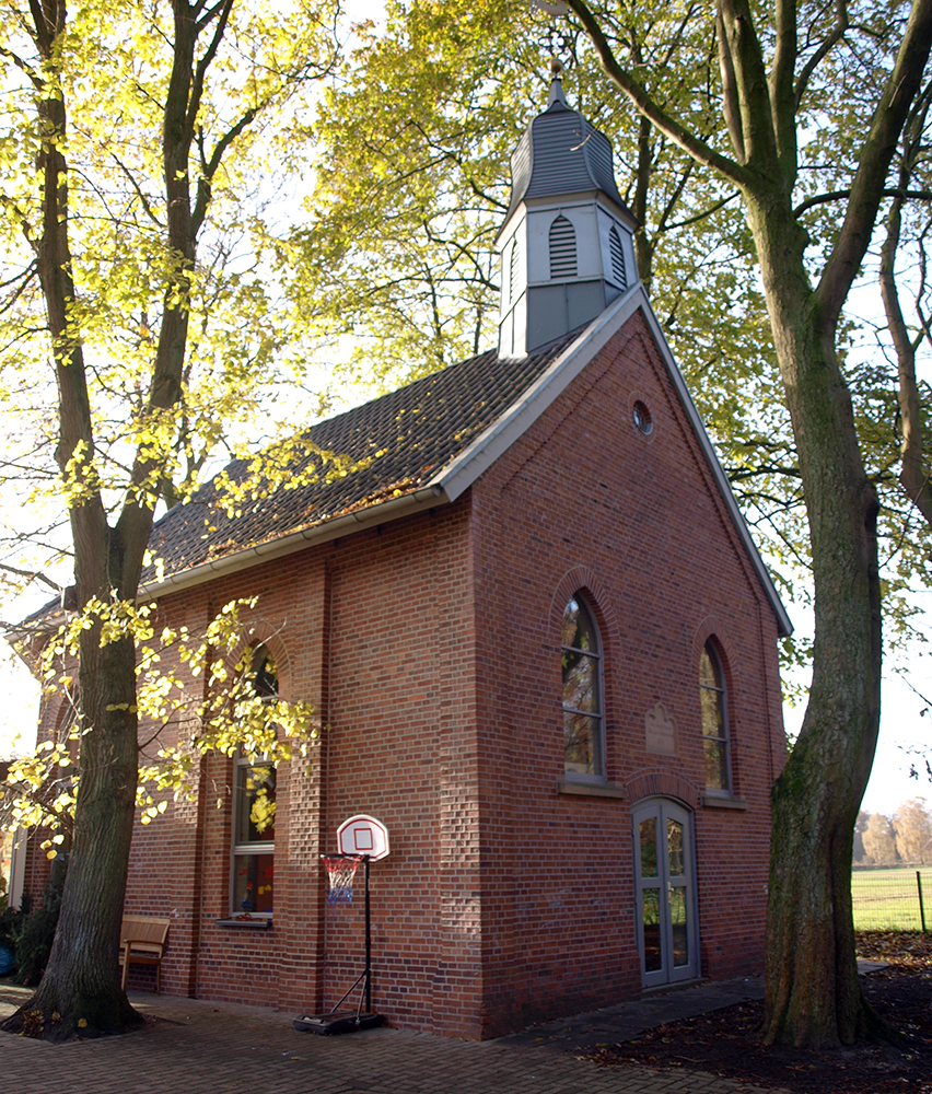 Ehemalige Kapelle in Brandlecht (Nordhorn). Heute Kindergarten.